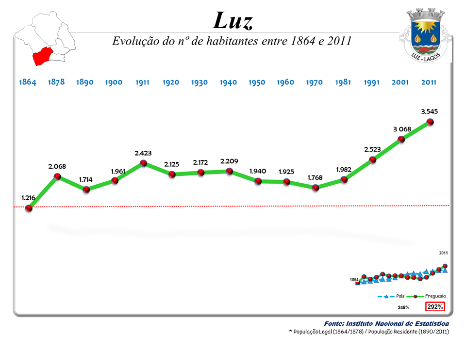 Censos 1864/2011